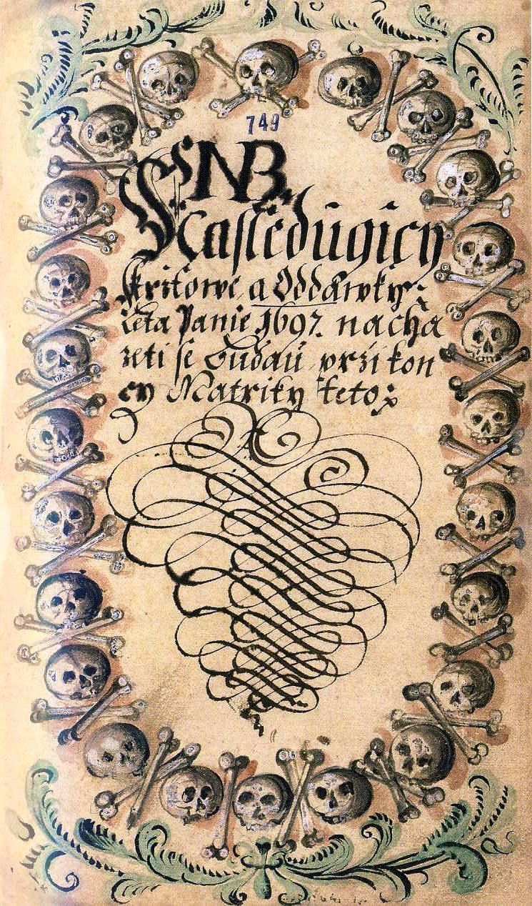 Matrika tripartitní fary Kutná Hora, titulní list části pro zemřelé, 1660.